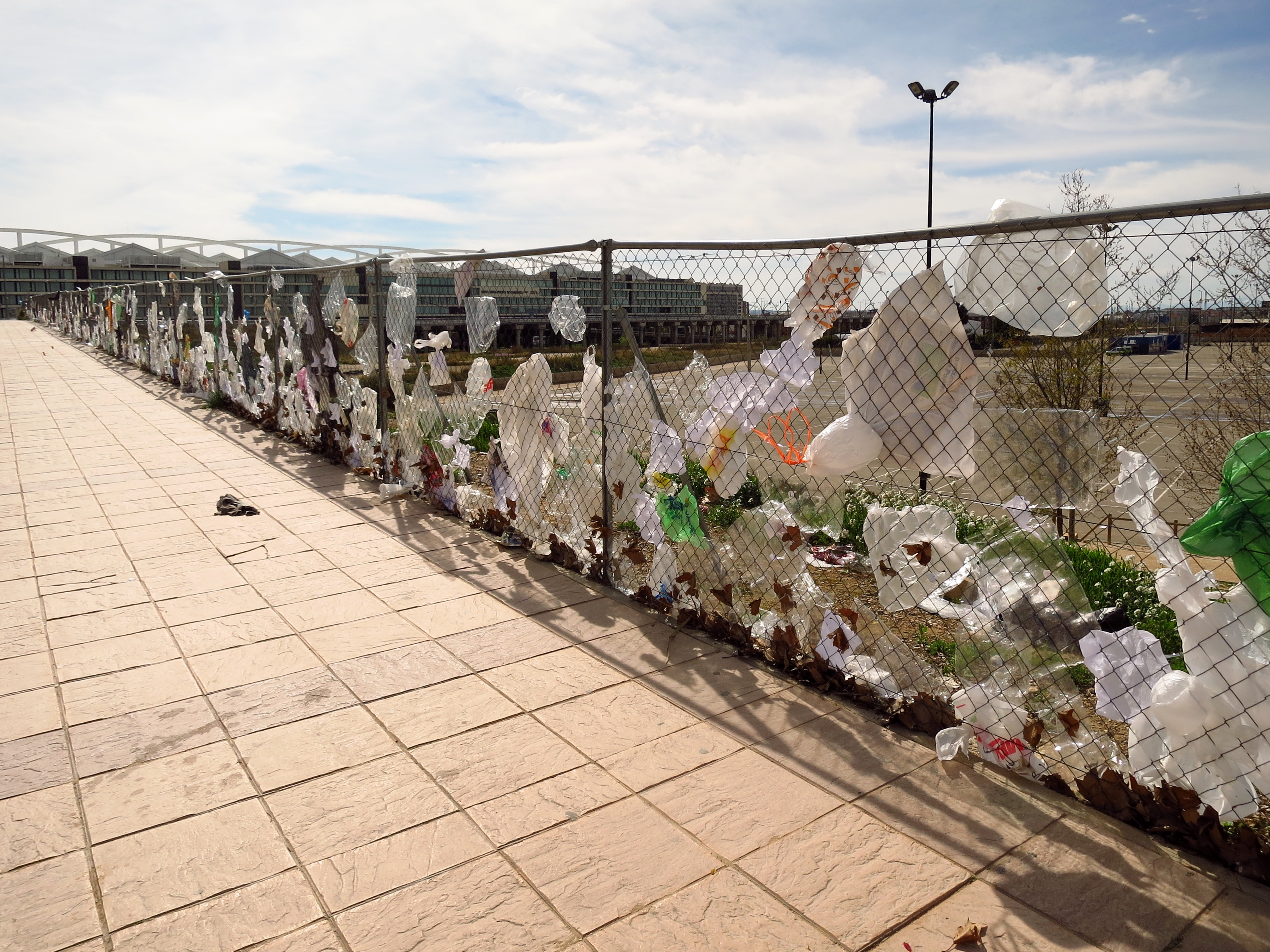 Zaragoza - Avenida Expo 2008. Bolsas plásticas atrapadas por una valla.